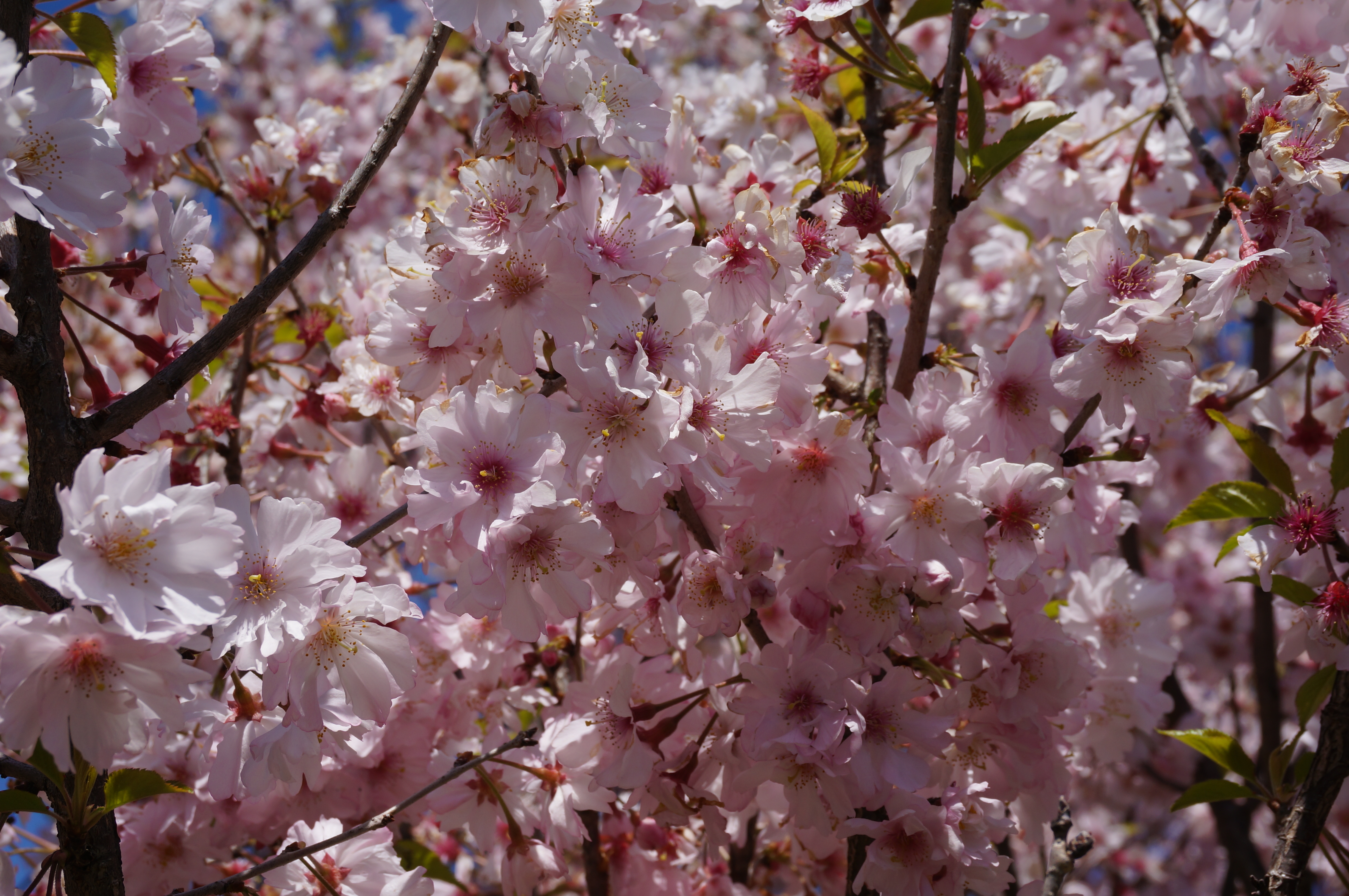 埼玉県熊谷市別府沼公園のクマガイ